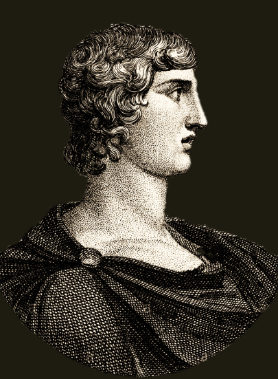 Agatocle re di Siracusa. 18 sec. Pubblico dominio.